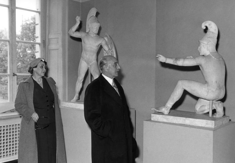 München, Haus der Kunst anlassl. des Besuches des griechischen Ministerpräsidenten Papagos von 30.6-6.7.1954